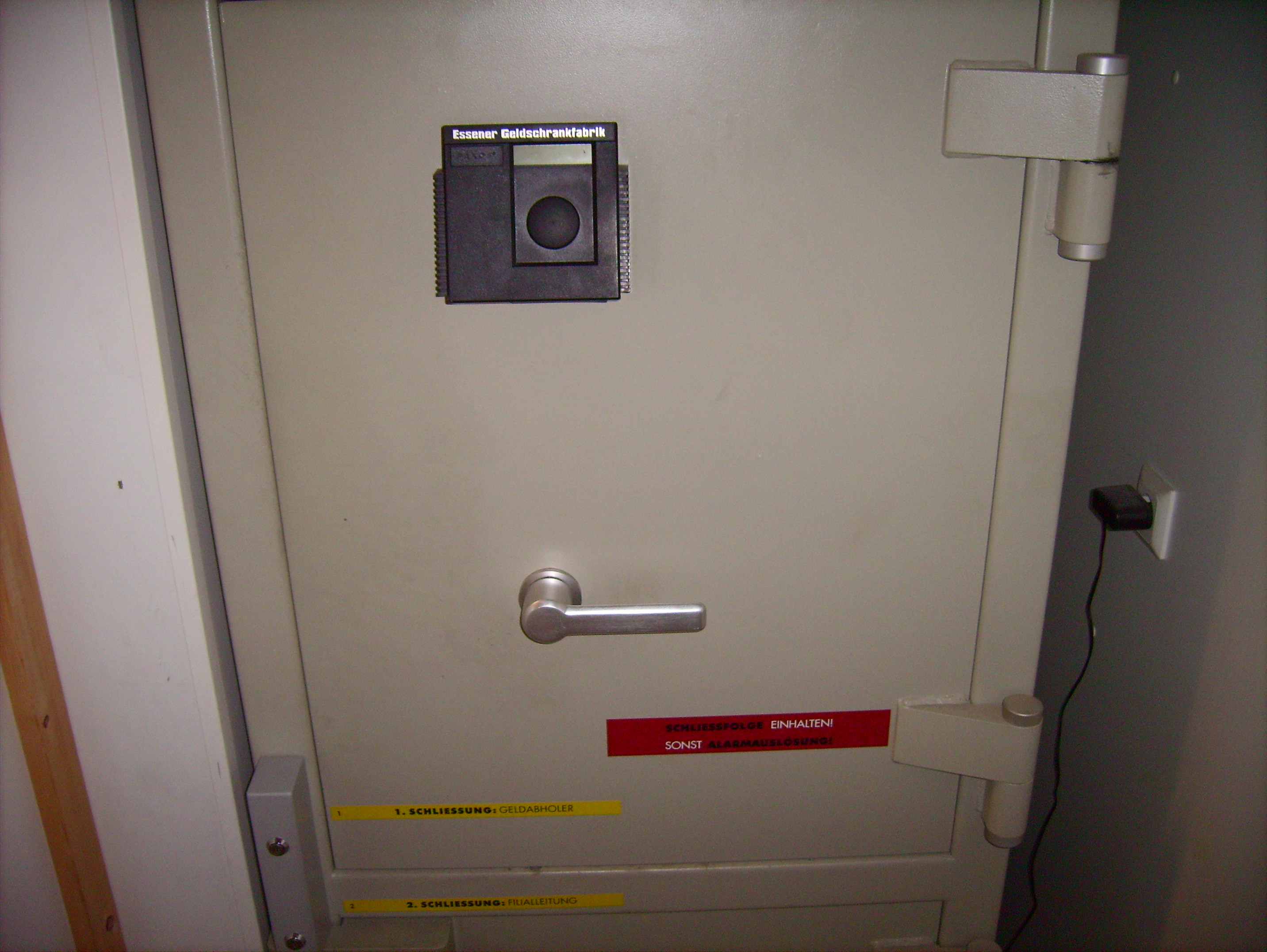 Essener Geldschrankfabrik